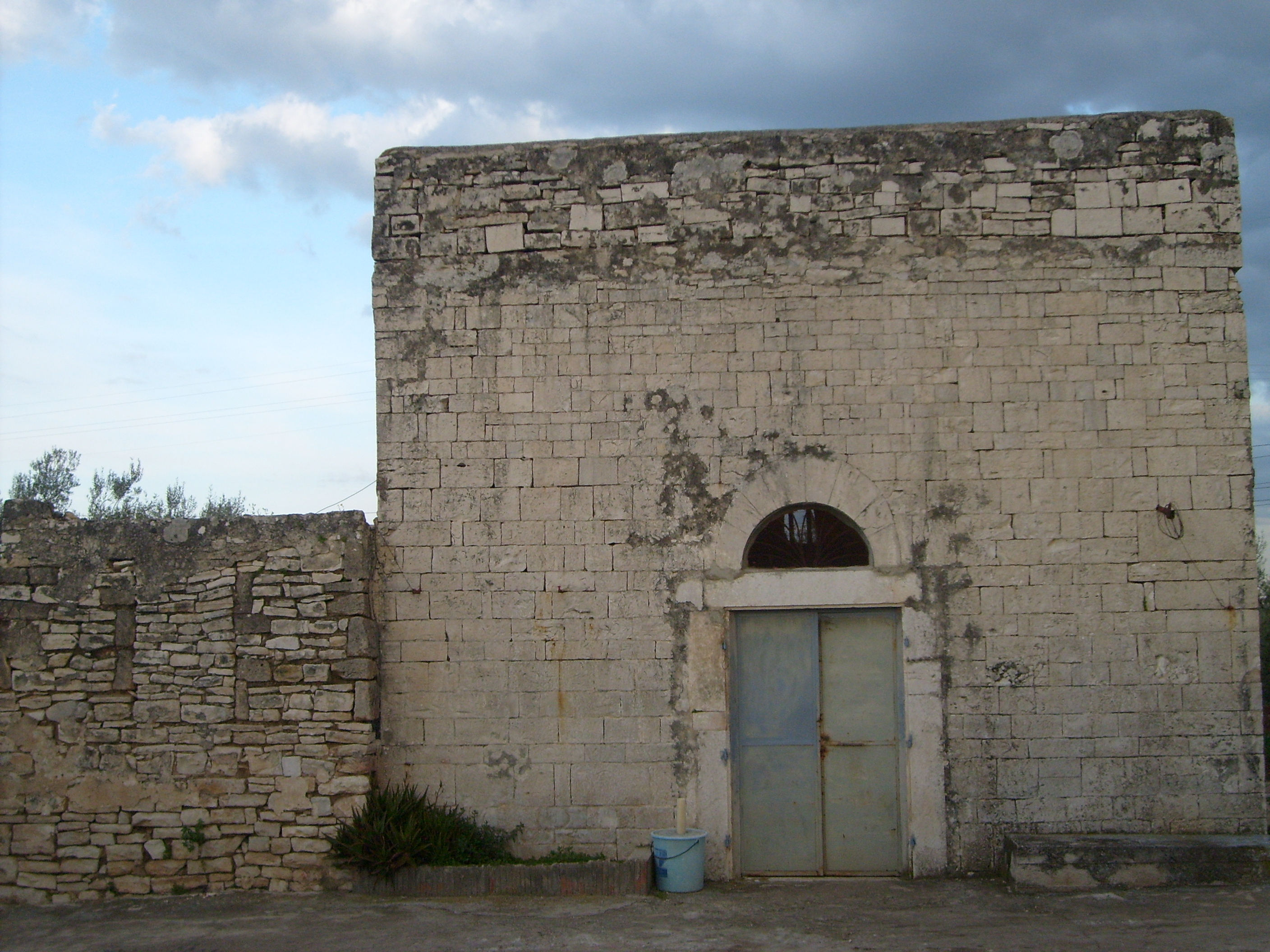 Chiesetta di S. Angelo